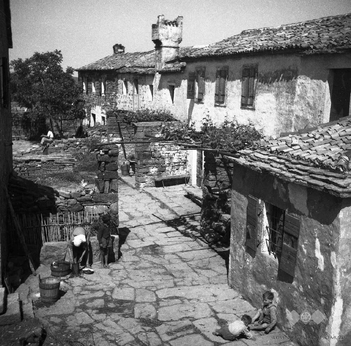 Boršt, Gorenjci, hiše v vrsti, južna dvoriščna stran.